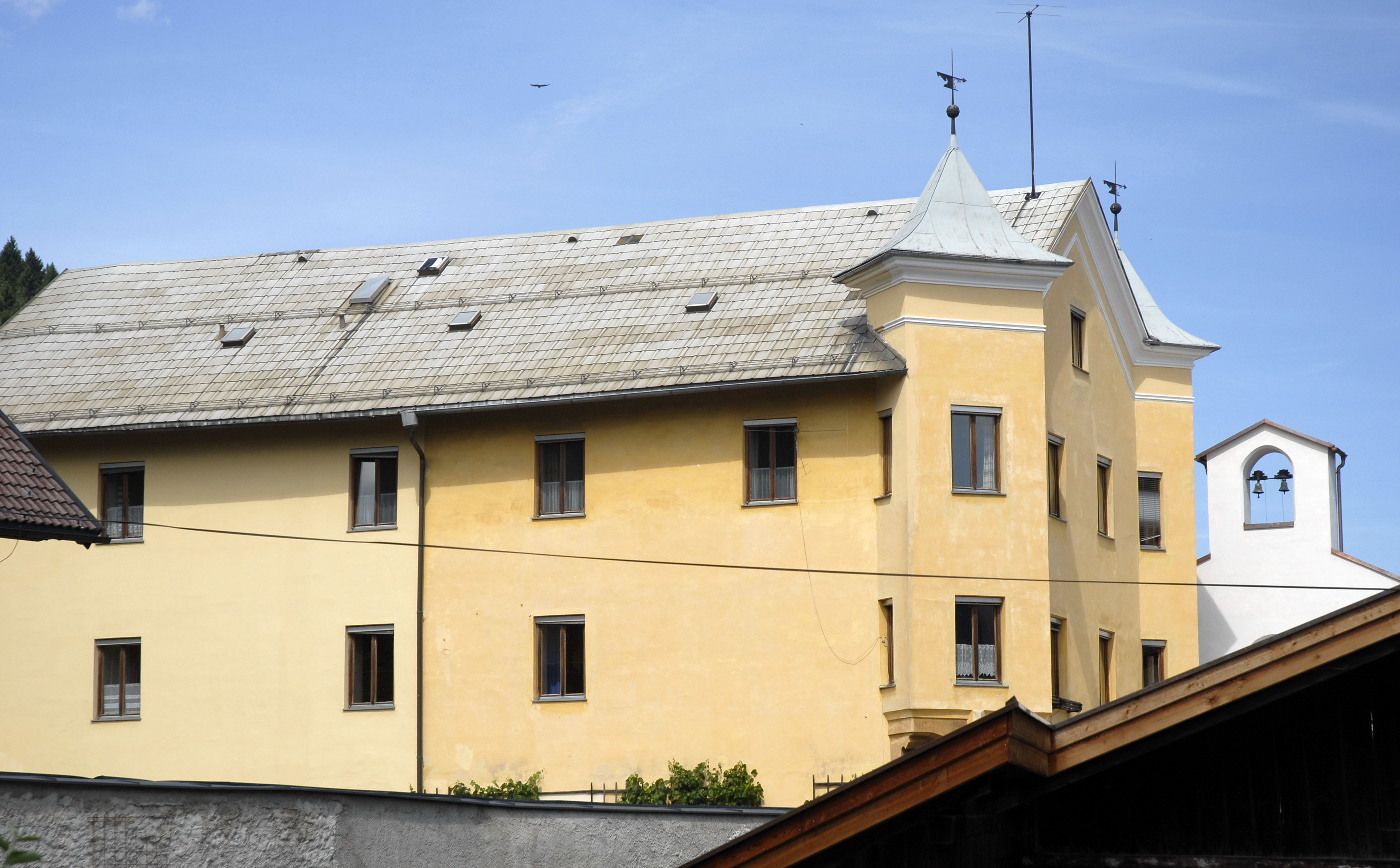 Schloss Wohlgemutsheim von Westen, Baumkirchen